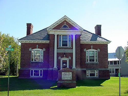 Franklin, Vermont